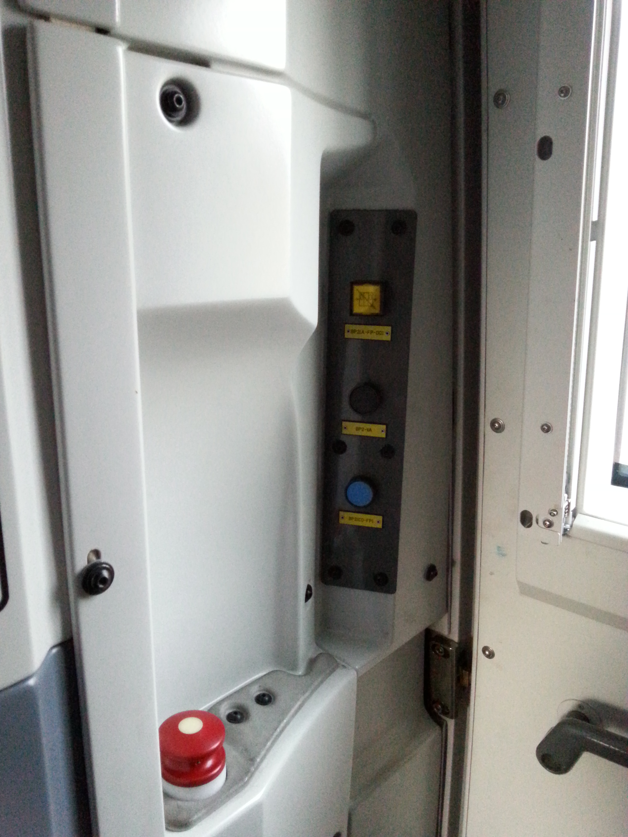 Vue sur la partie droite d'une cabine de Z50000.